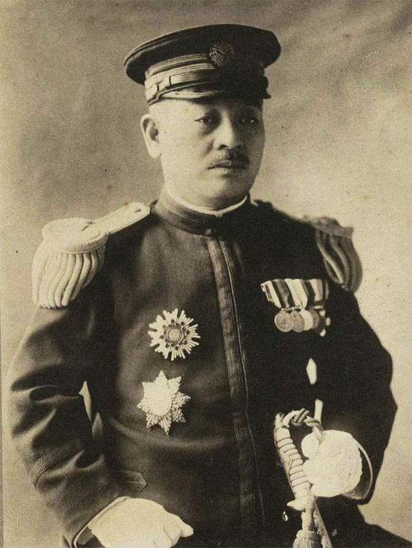 中文（台灣）: 1932年5月27日－1936年9月1日任第16任臺灣總督，為台灣最後一任的文官總督。